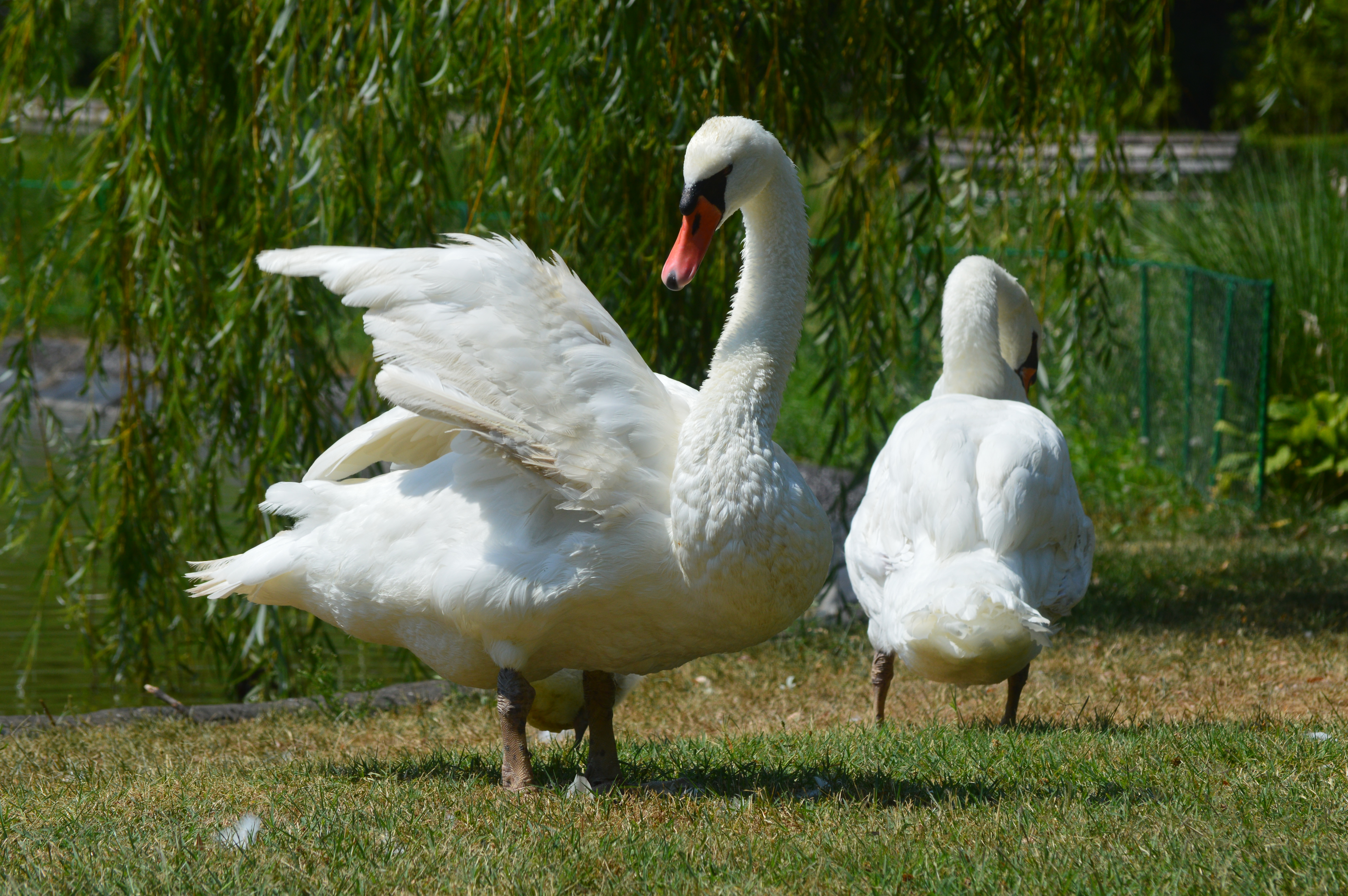 Srpski (latinica): дотеривање Ово је фотографија заштићеног природног добра у Србији под шифром: СП086 This is a a photo of a natural area in Serbia with ID: СП086